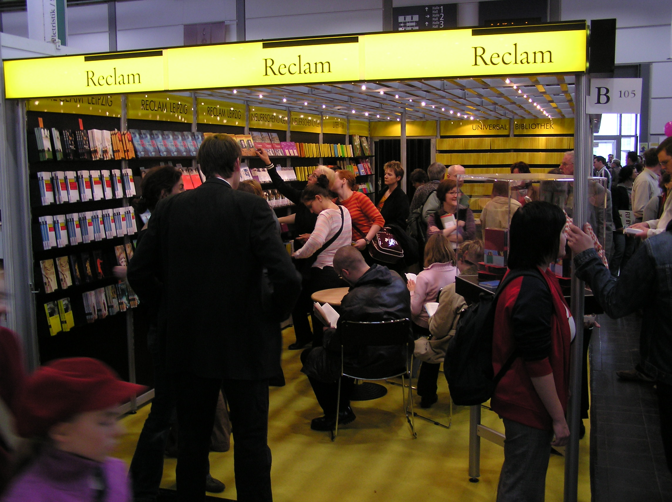 Stand vom Reclam-Verlag auf der Buchmesse Leipzig 2005